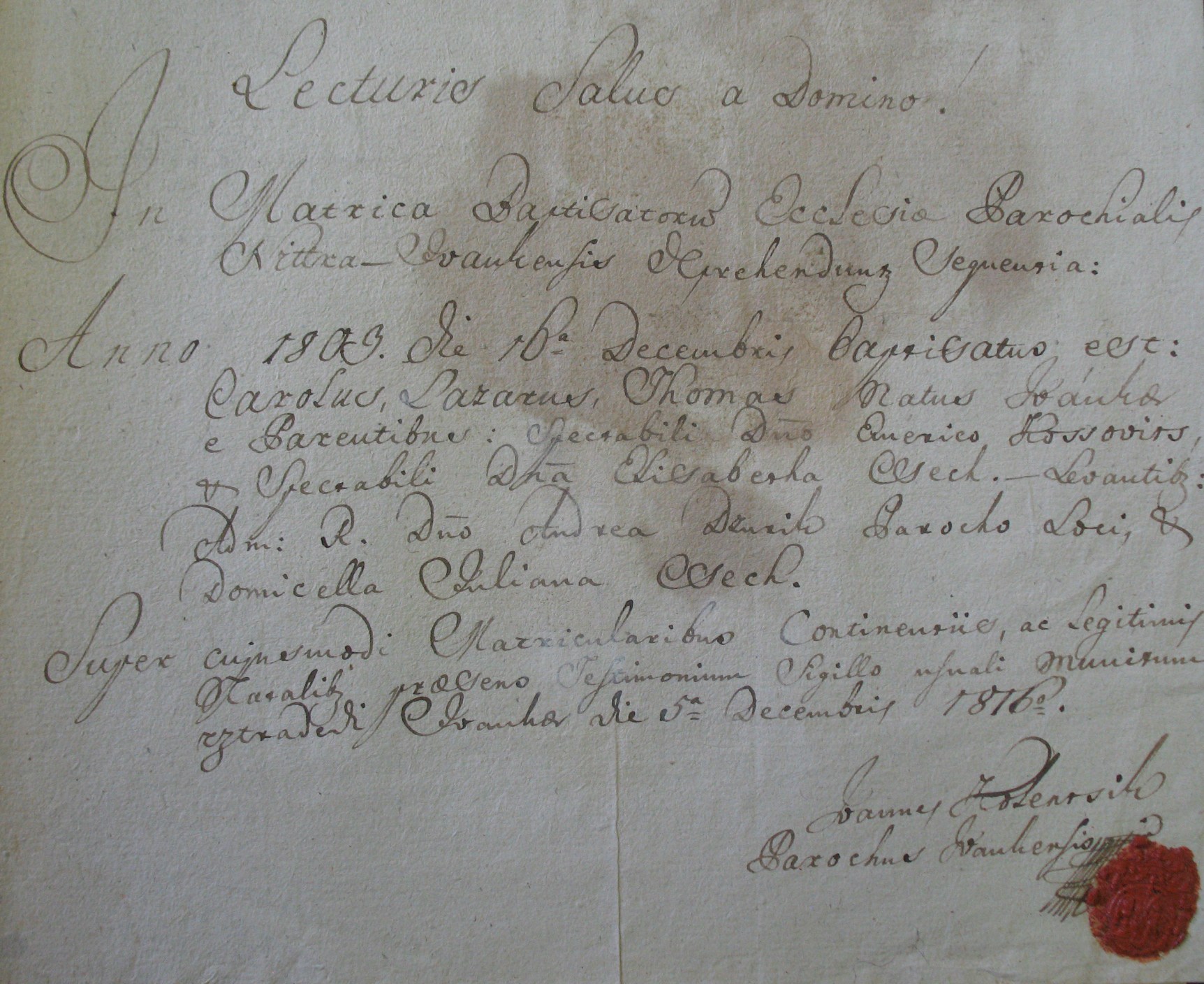 Kossovich Károly születési kivonata - ŠA Nitra, Nobilitaria, Kossovich